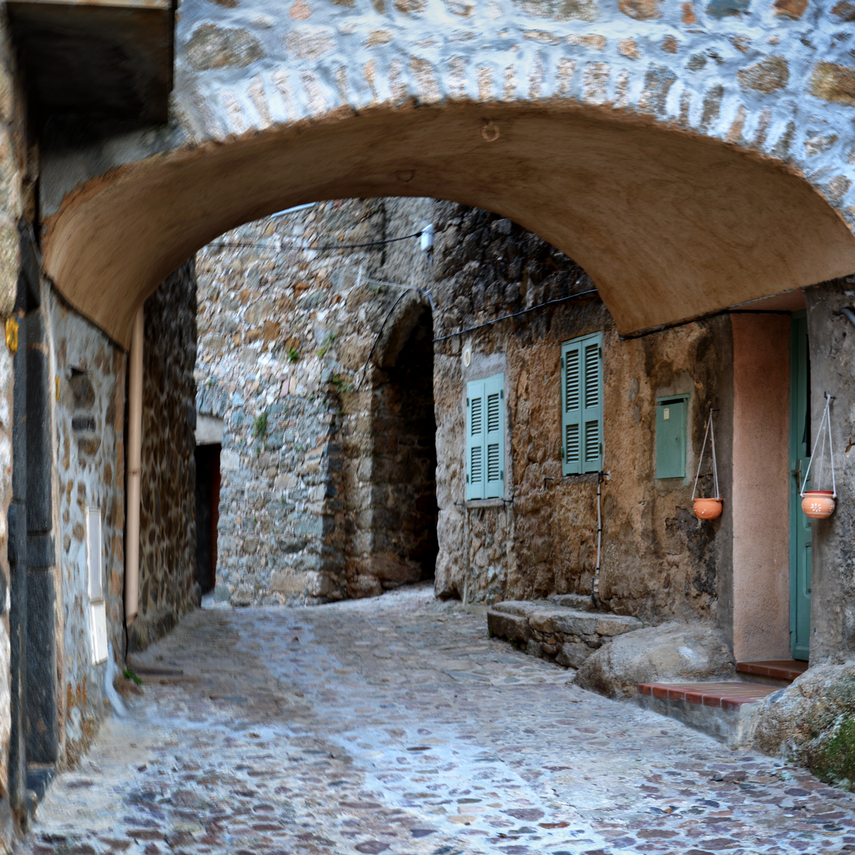 Cateri, Balagne (Corse) - Au cœur du village, avec ses ruelles empierrées et ses passages voûtés